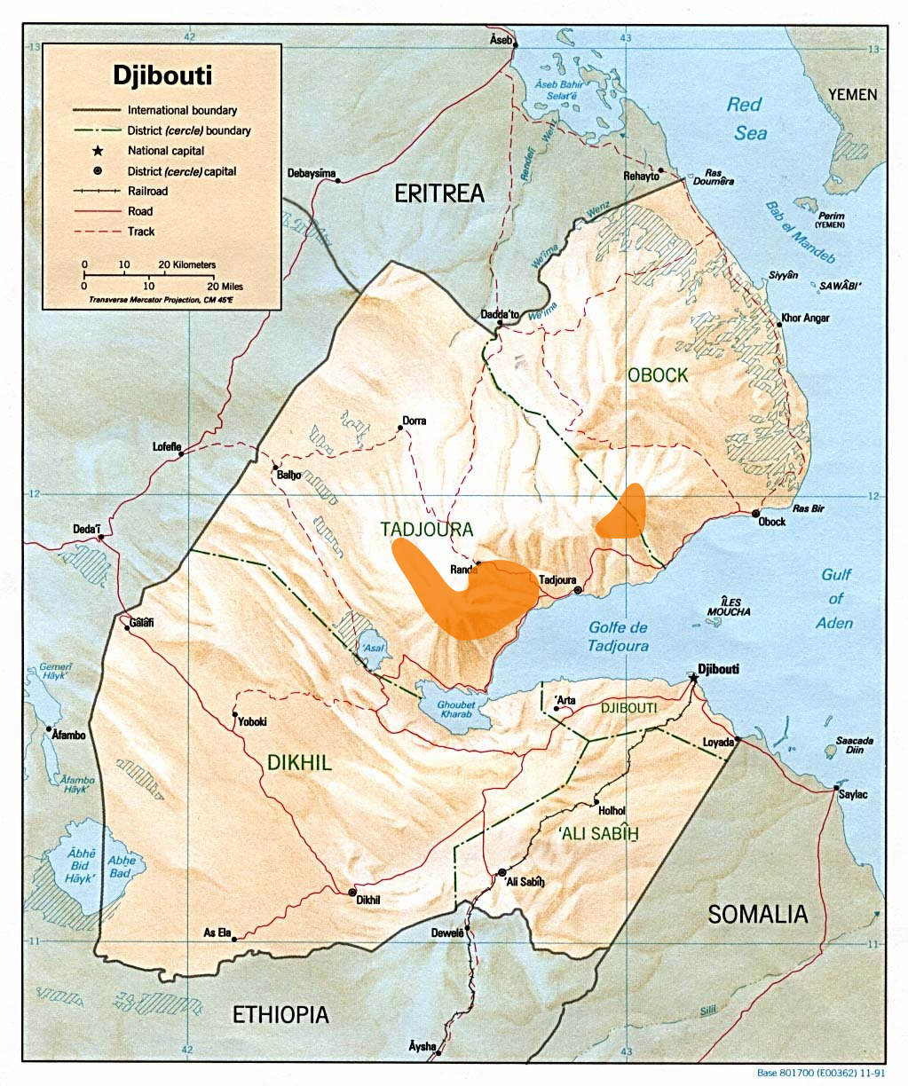 Djibouti Francolin distribution (from